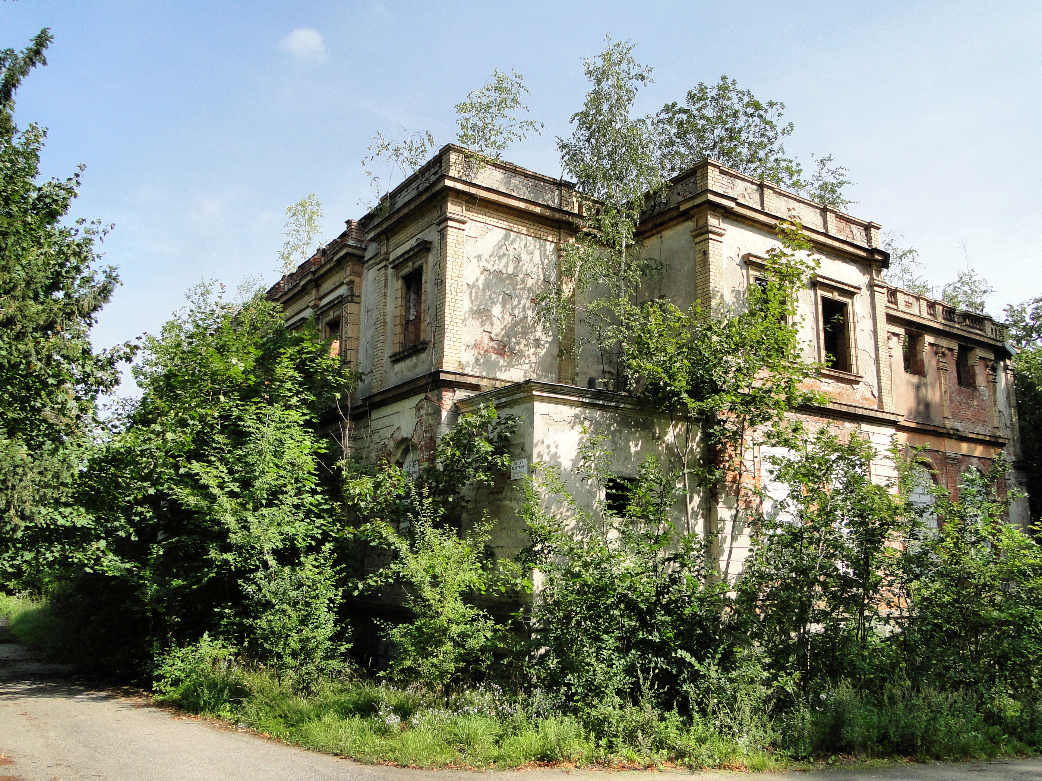 Witnica - folwark (zespół), pałac (ruina)